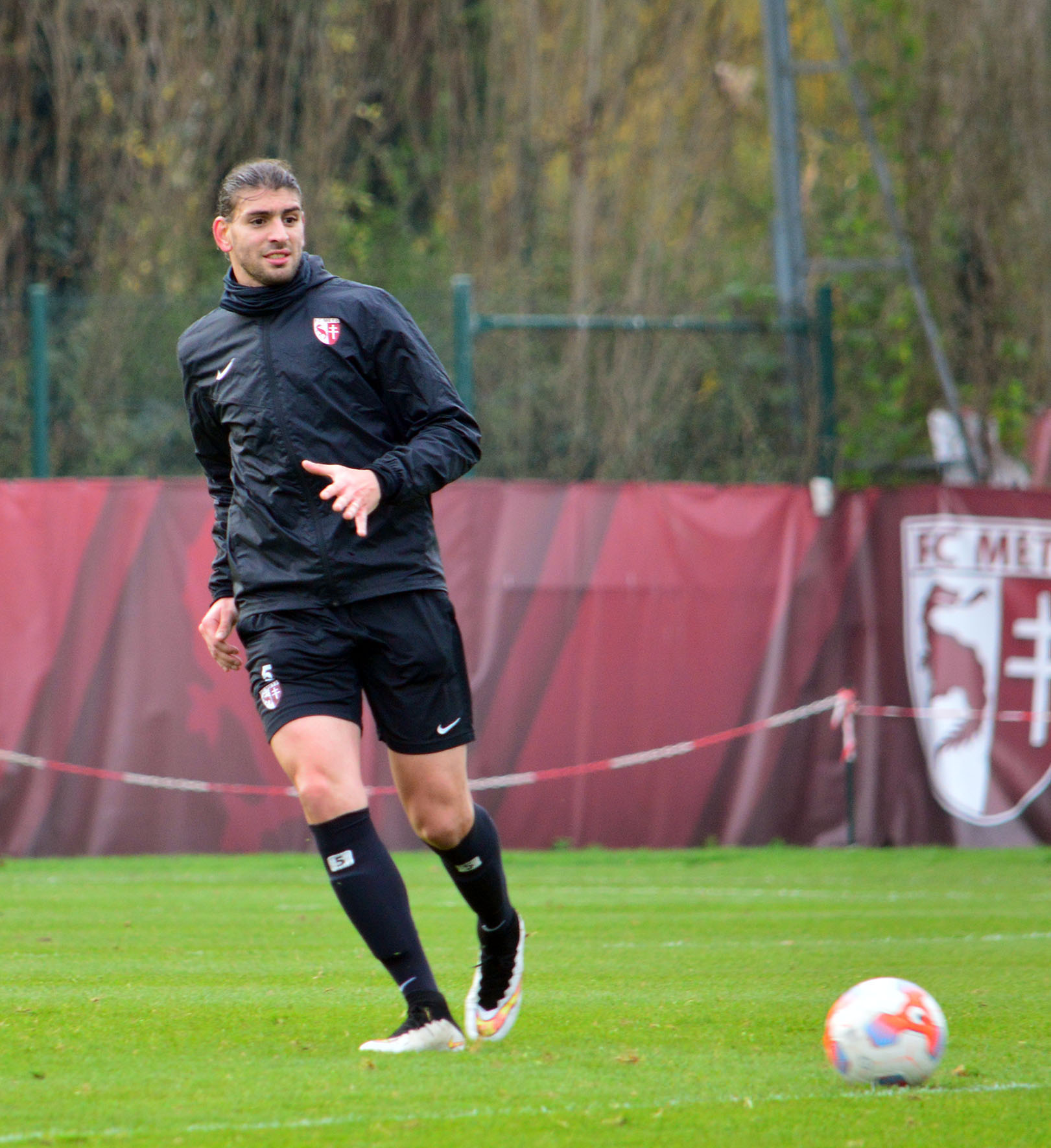 Guido Milán à l'entraînement du FC Metz en 2015